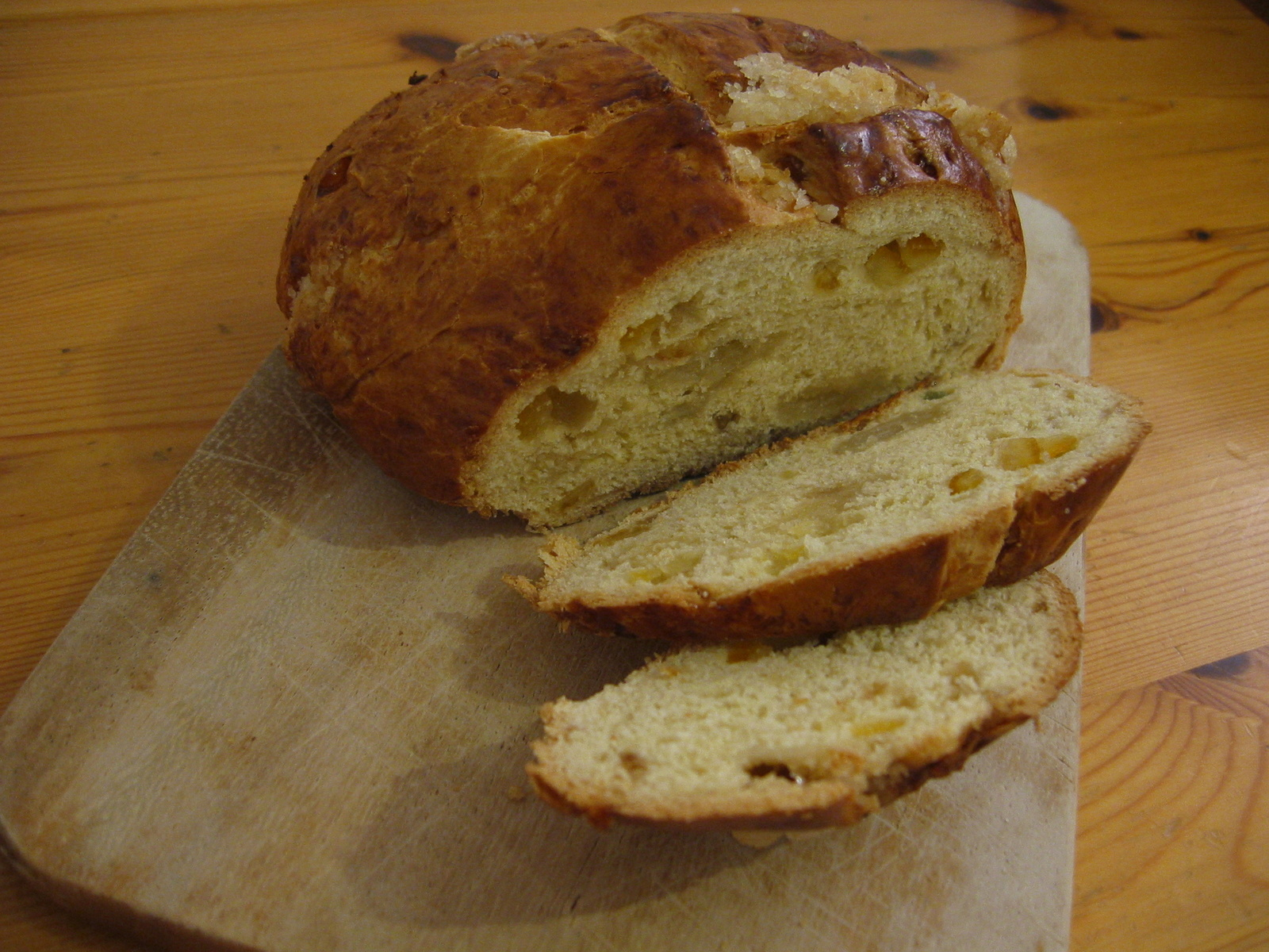 Ein Poschweck der Aachener Bäckerei Nobis Printen